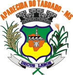 Brasão de Aparecida do Taboado